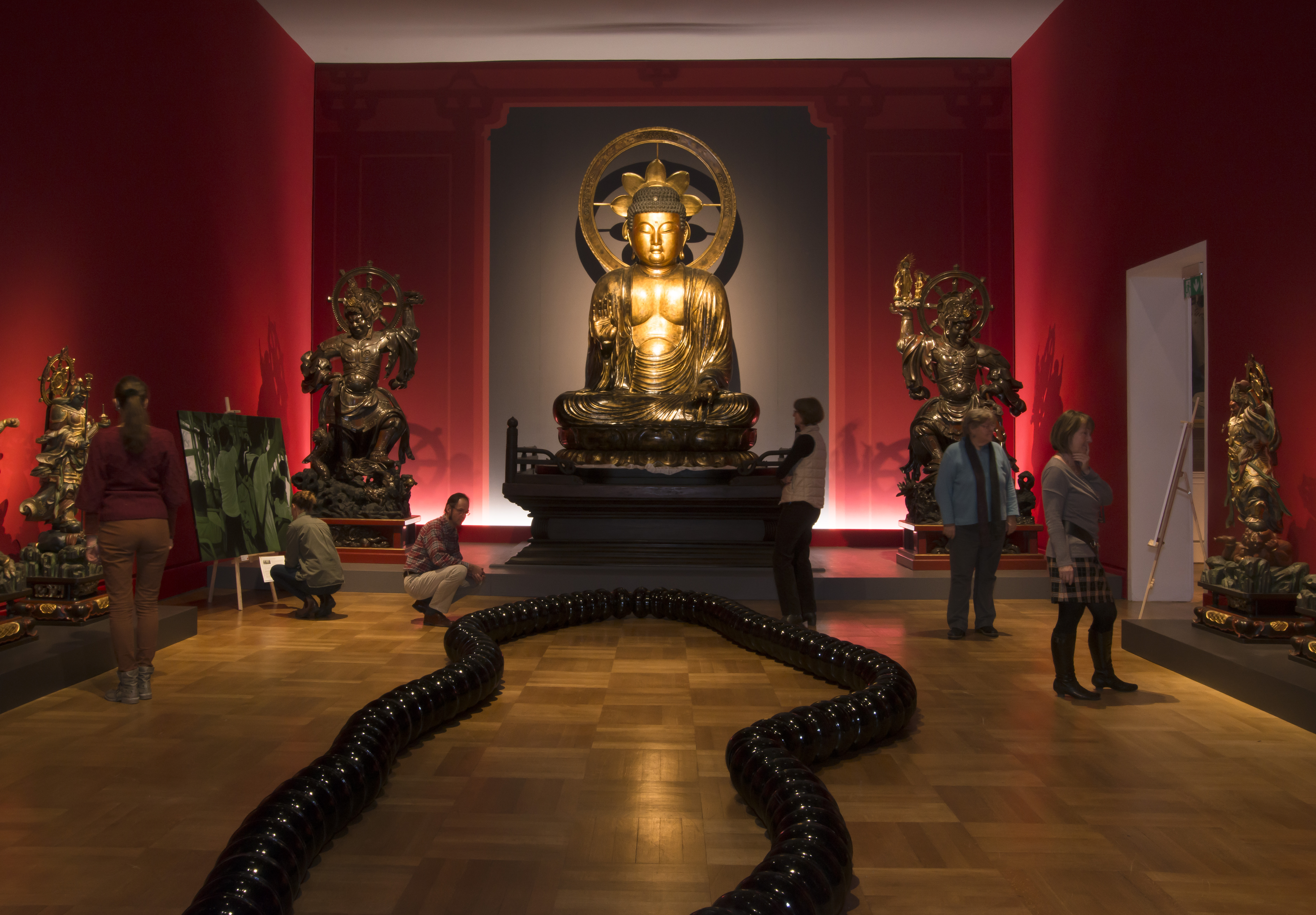 Buddhasaal mit einer Installation von Htein Lin